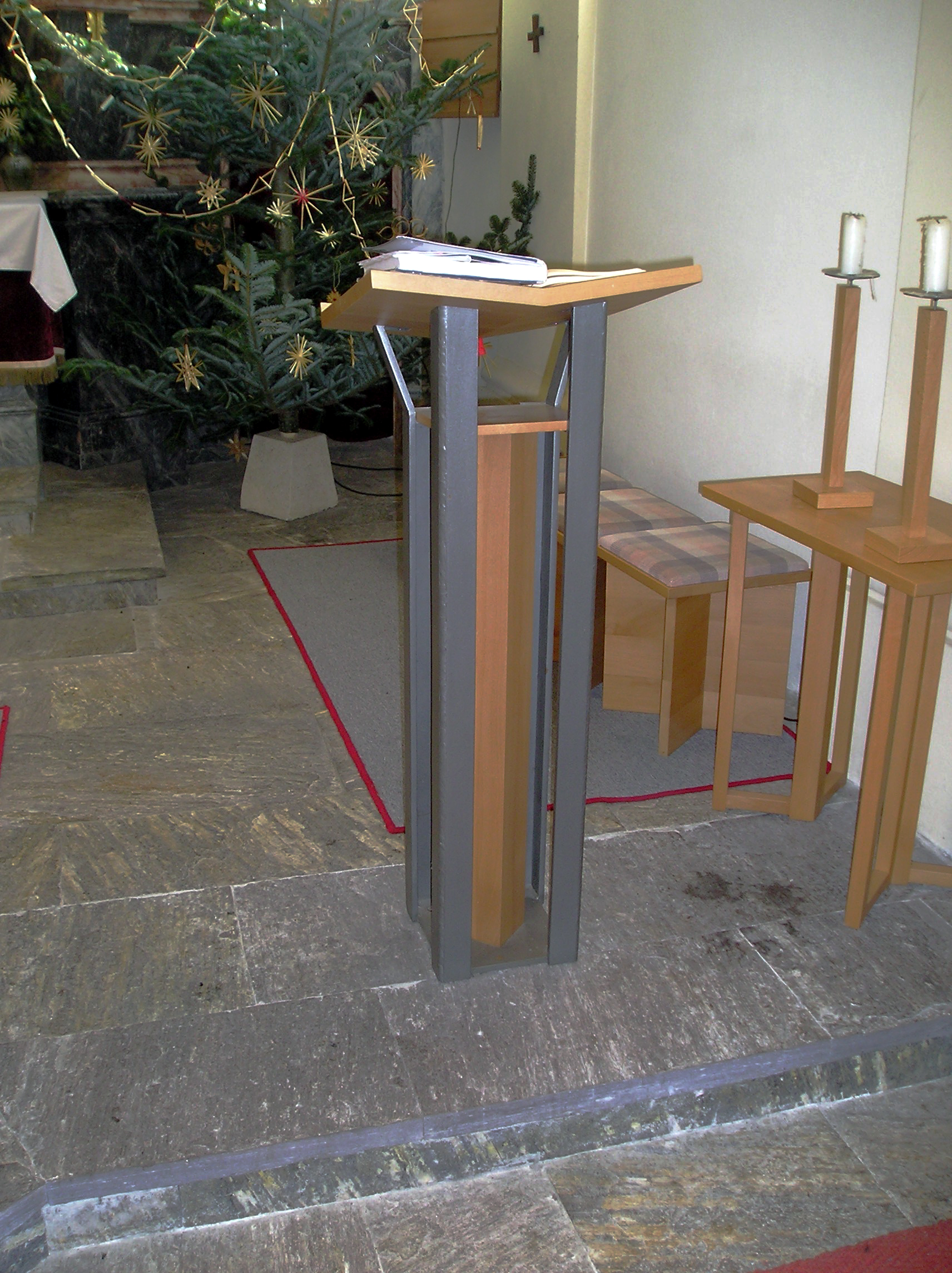 Abbildung des Ambo in der röm.-kath. Pfarrkirche St. Jakob i. Freiland. Die künstlerische Gestaltung wurde von Alois Krammer ausgeführt, die handwerklichen Arbeiten führte Karl Krammer aus. Selbst fotografiert am 27.01.2006 von Fklug